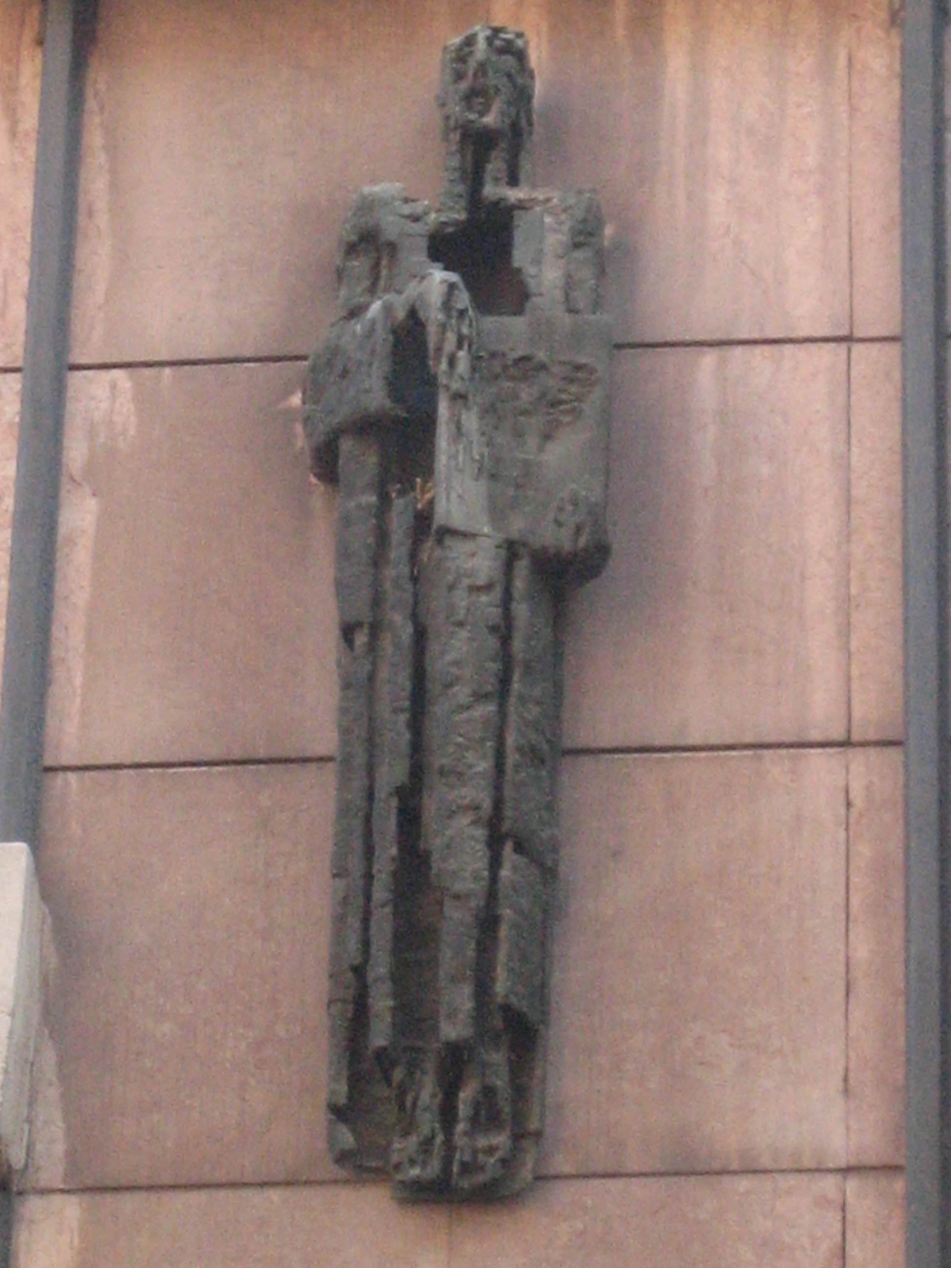 Estatua de San Francisco, obra de Lucarini, en la iglesia de San Francisco, en Bilbao